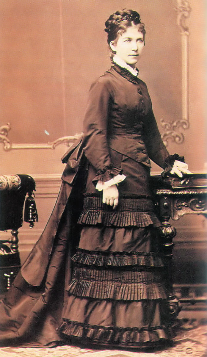 Vörösmarty Ilona, Vörösmarty Mihály lánya, Széll Kálmán felesége